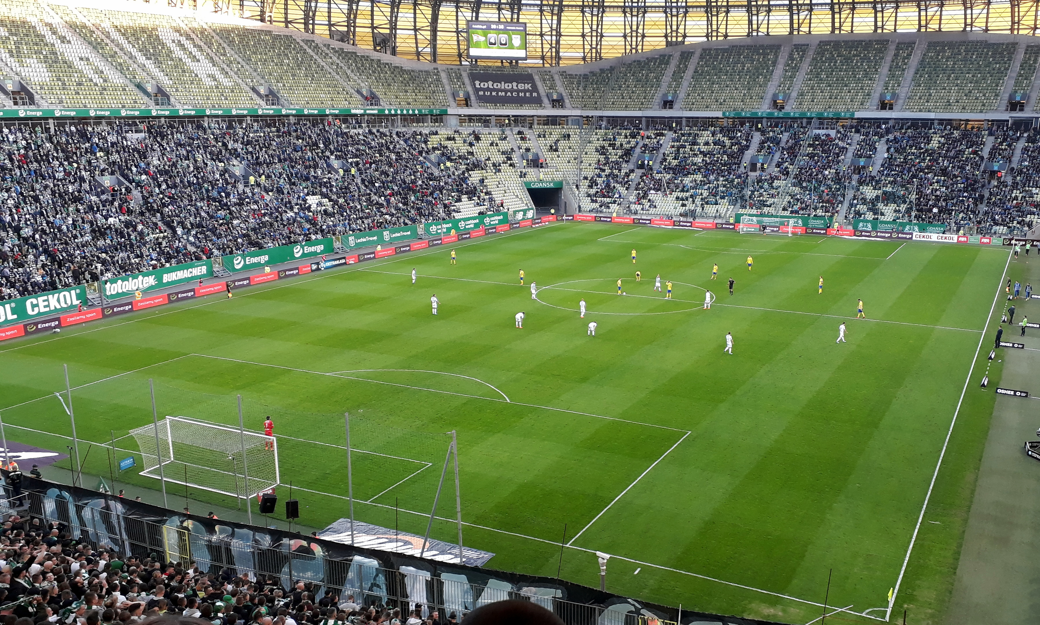 39. Derby Trójmiasta w piłce nożnej • Lecha Gdańsk – Arka Gdynia (4:2) • 7 kwietnia 2018 r. • PGE Arena Gdańsk